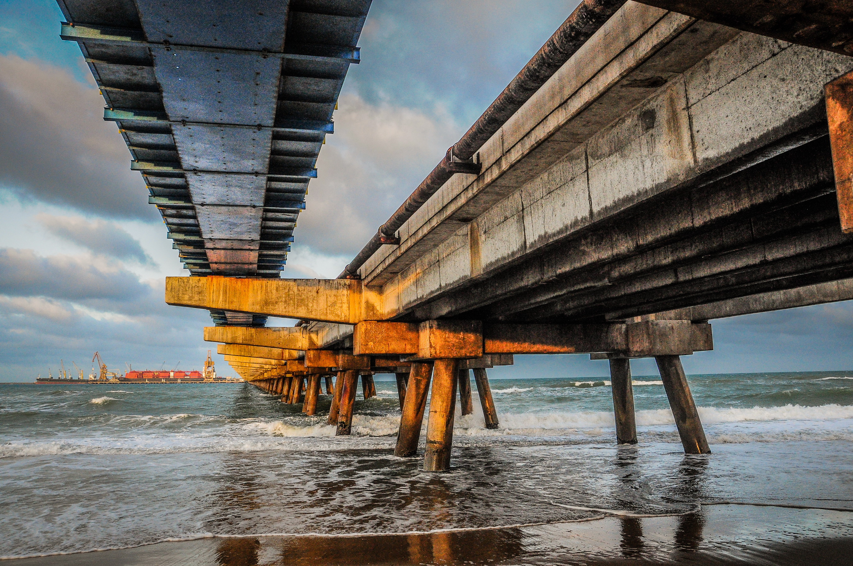 Foto tirada no âmbito do pecém/ce